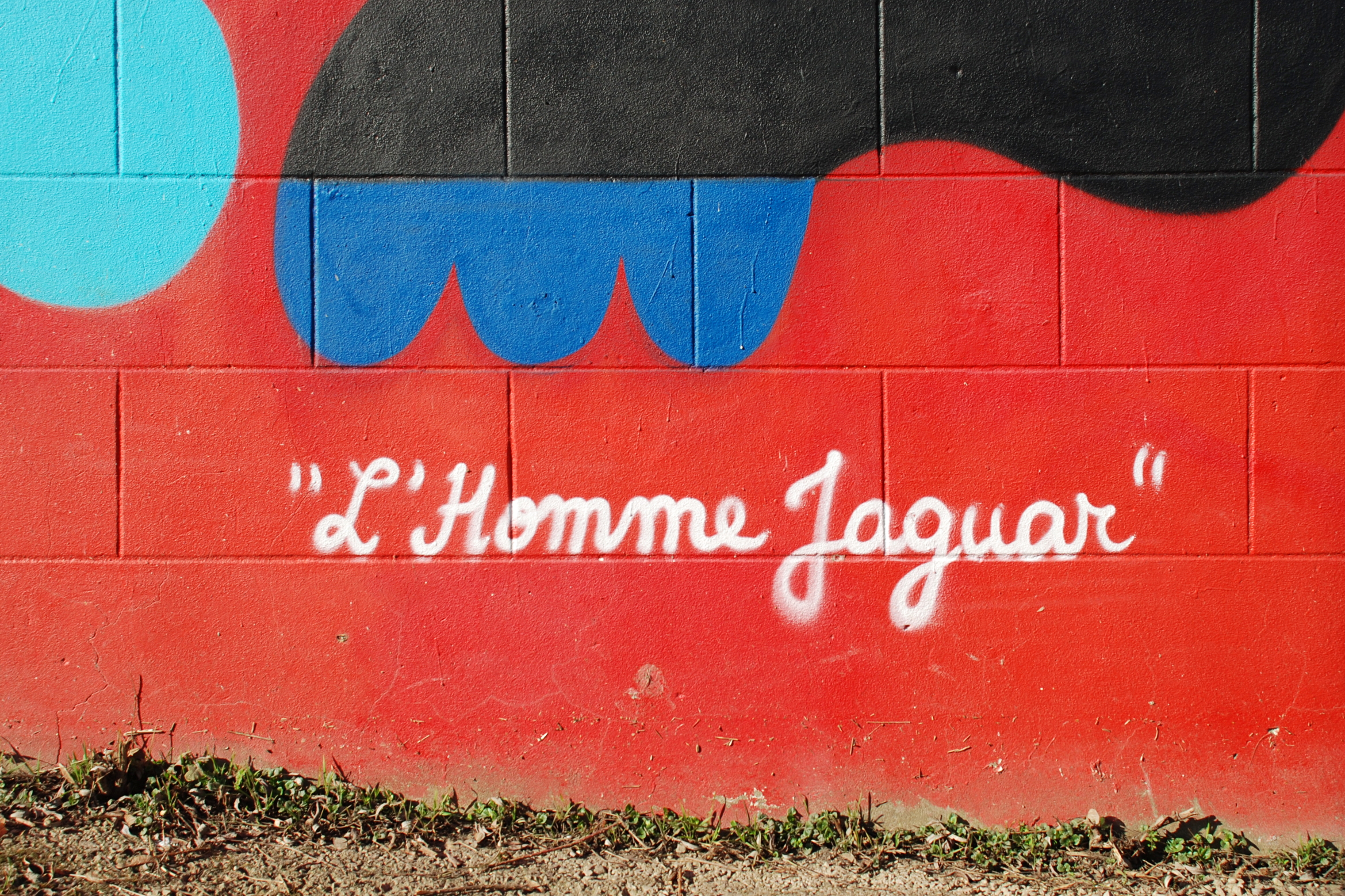 Belgique - Louvain-la-Neuve - Nationale 4 - Fresques de Remed et 3TT (Kosmopolite Art Tour 2015 à Louvain-la-Neuve)